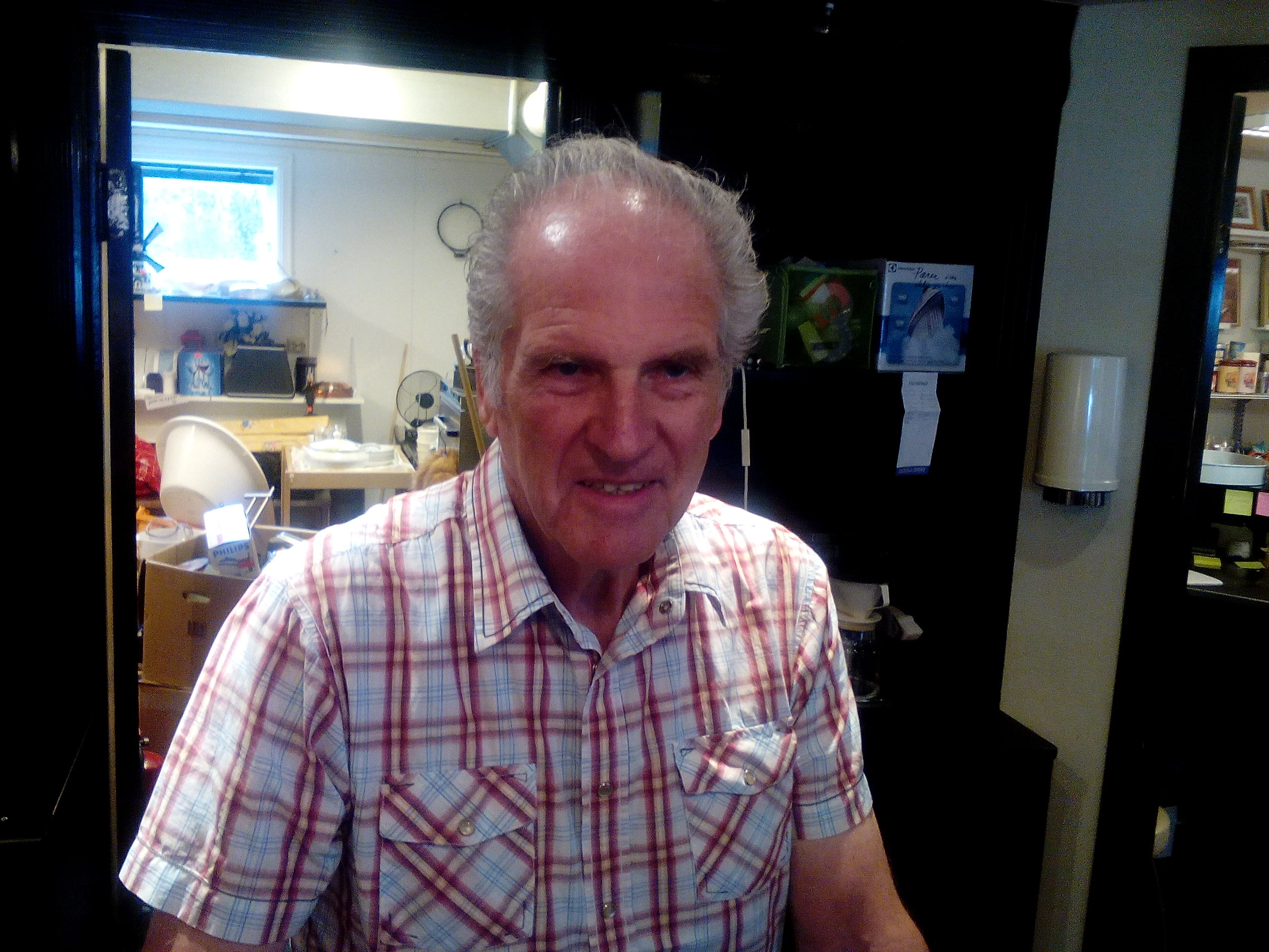 Kjell Furnes, stortingsrepresentant for KrF 1985-1989